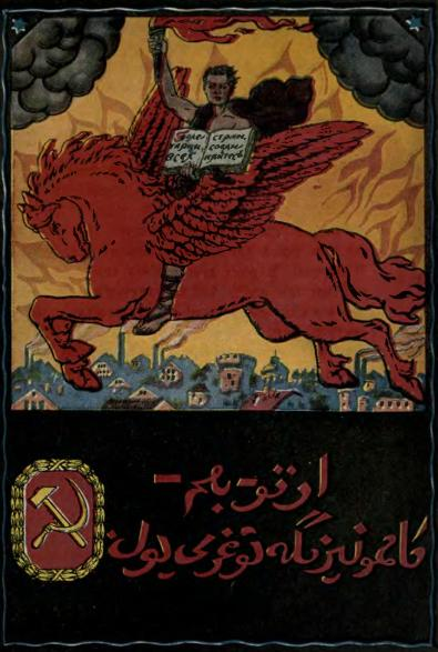 Cartel del propaganda soviético en árabe: "proletarios del mundo, ¡uníos!".